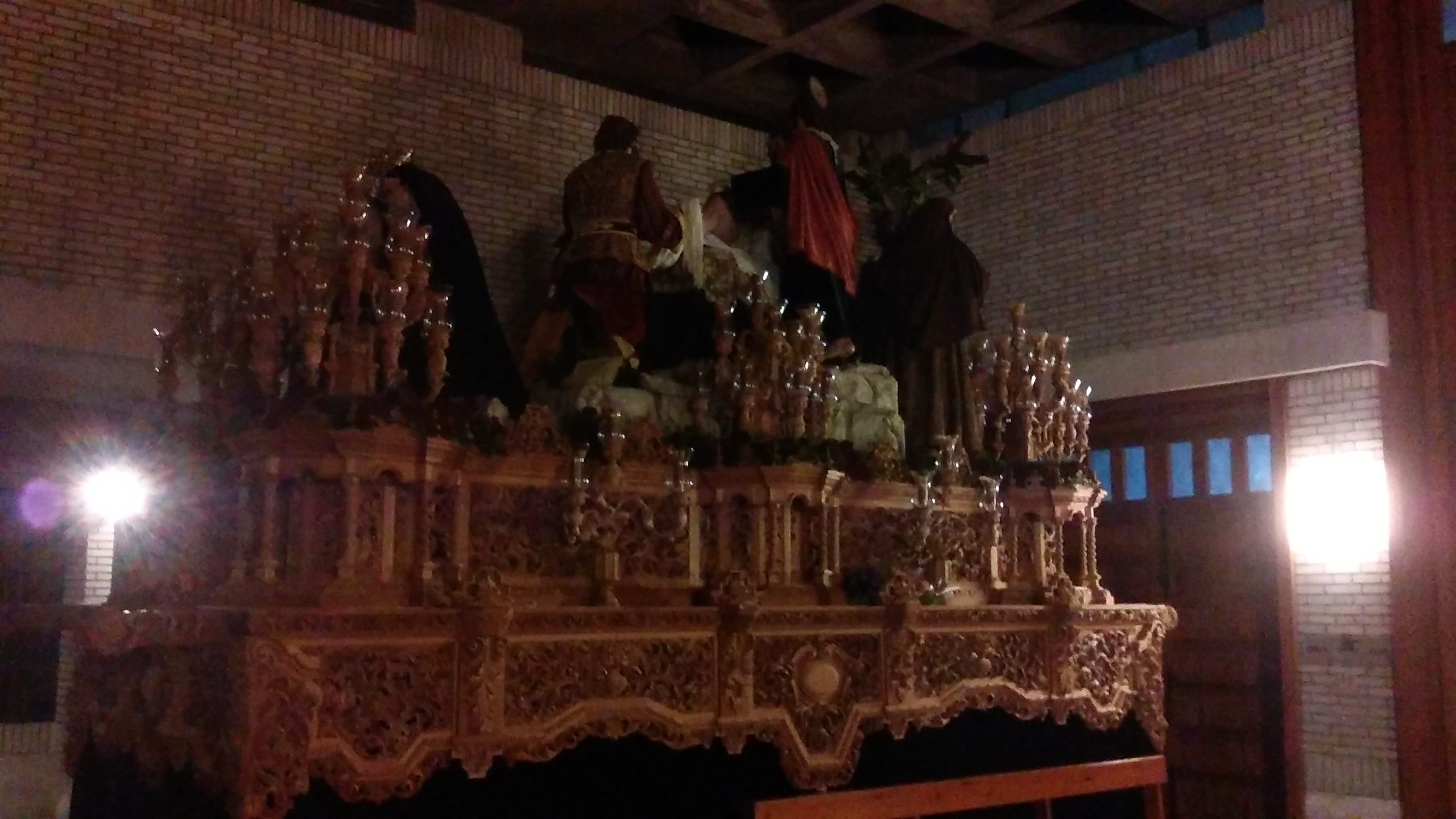 Iglesia conventual de los Padres Capuchinos en Jerez de la Frontera (Andalucía, España) en la Semana Santa de 2016 This is a photography of a Folklore festival in Spain (Wikidata id Q6124533).